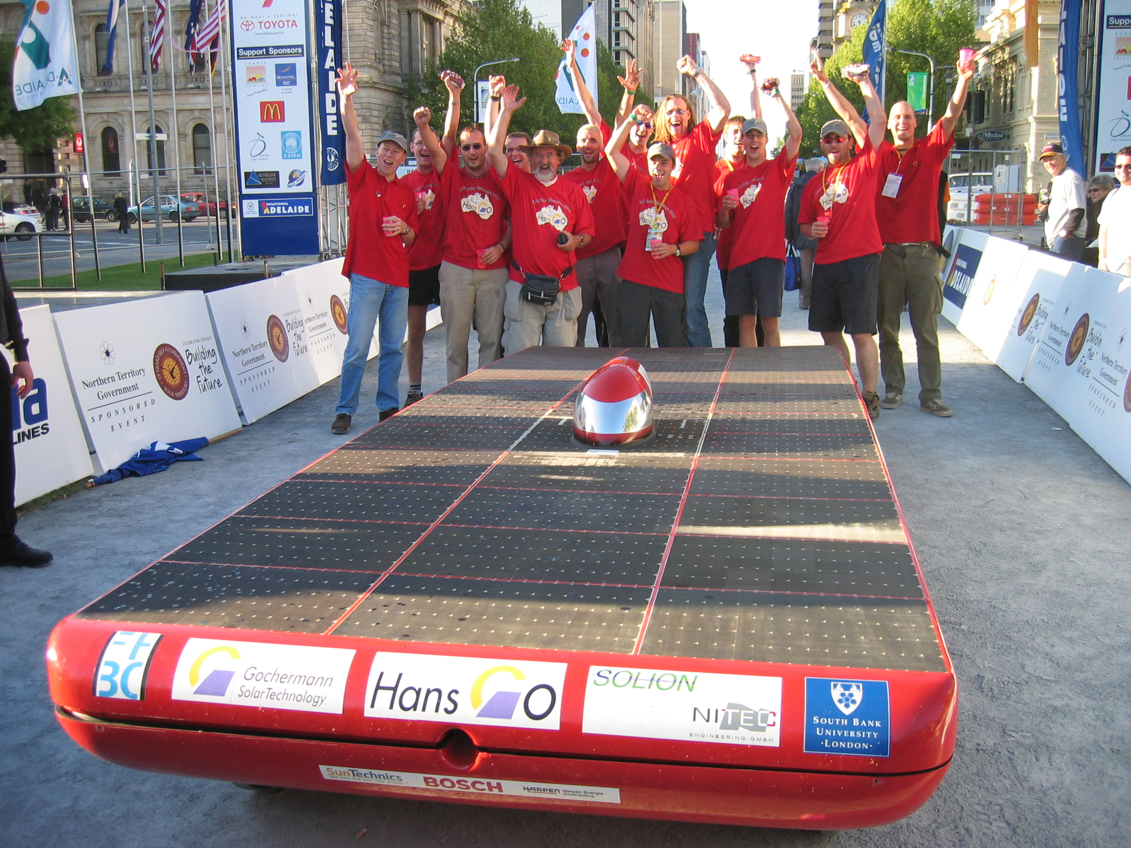 HansGO!, Solarcar der Hochschule Bochum, im Ziel der World Solar Challenge 2003